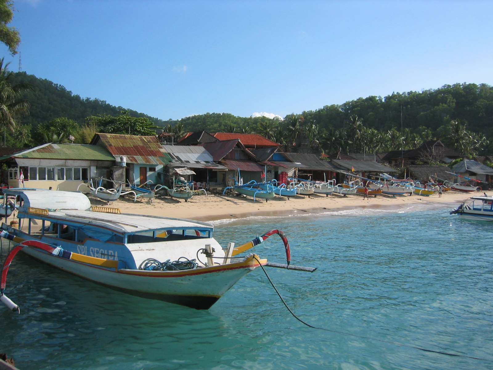 Padangbai, Bali, Indonesien